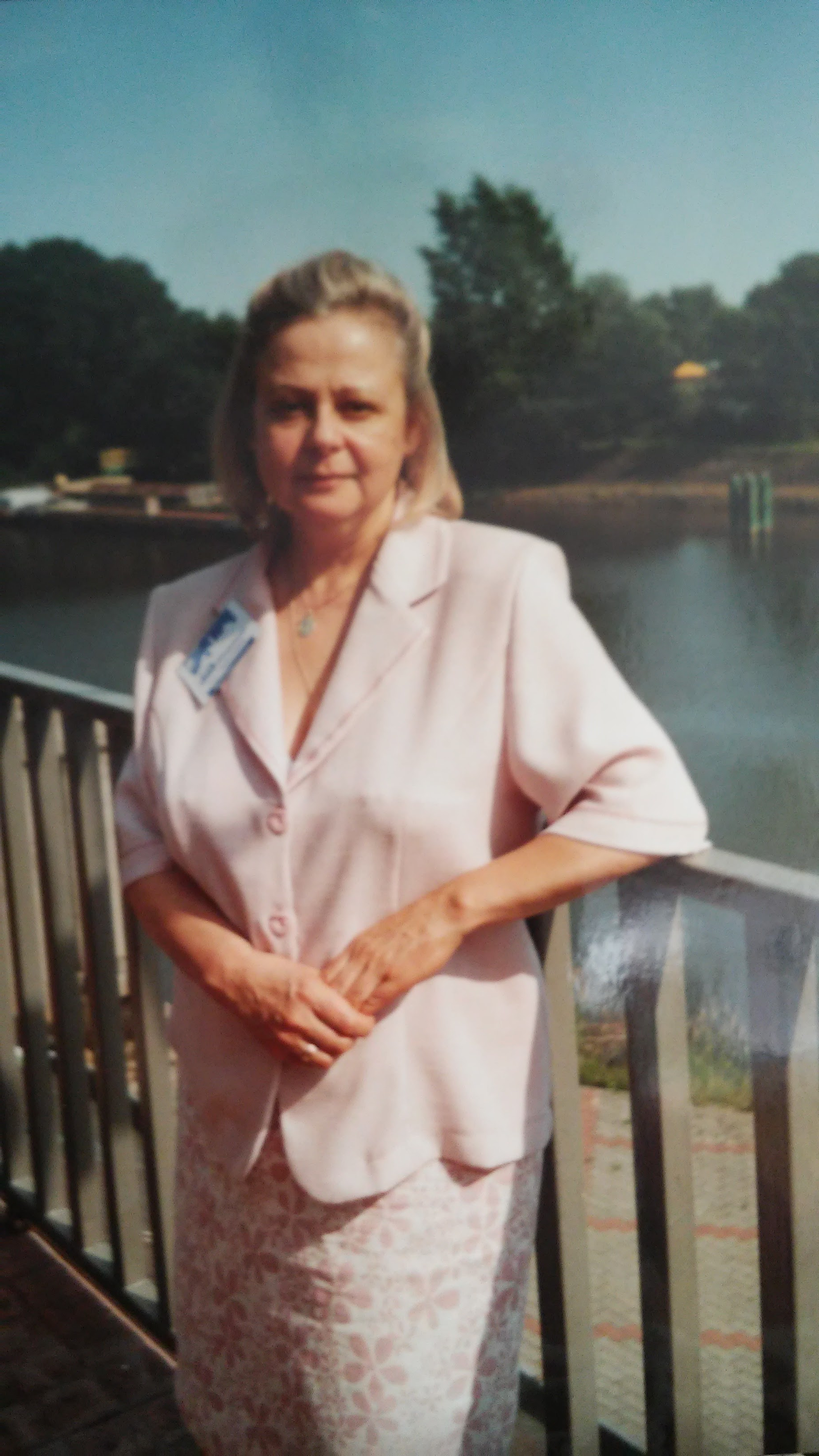 Maria Krystyna Pawłowska-Godlewska